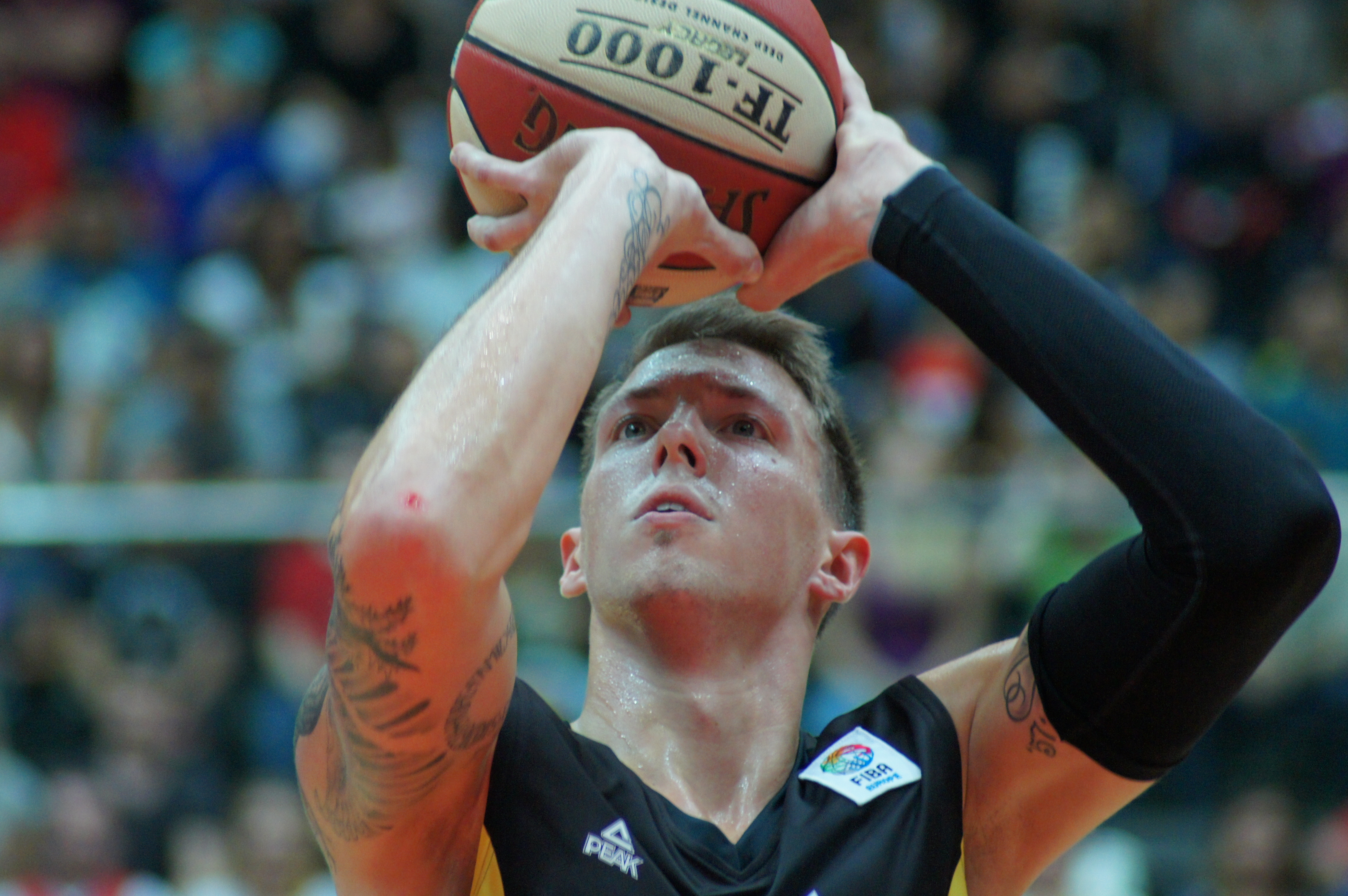 Qualifikationsspiel EuroBasket Österreich - Deutschland, 13. August 2014 im Multiversum Schwechat.